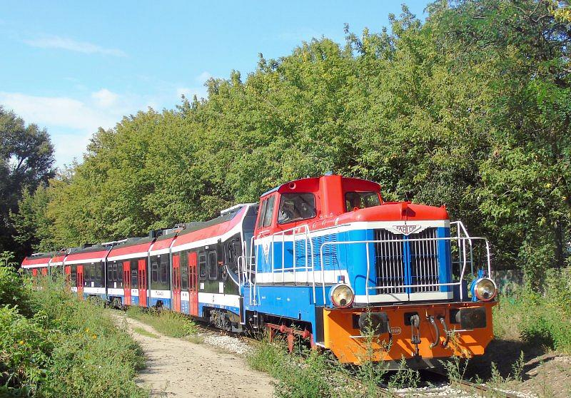 Spalinowa lokomotywa manewrowa 401Da-314 należąca do WKD prowadzi elektryczny zespół trakcyjny EN100-06 do zaplecza technicznego przewoźnika w Grodzisku Mazowieckim.